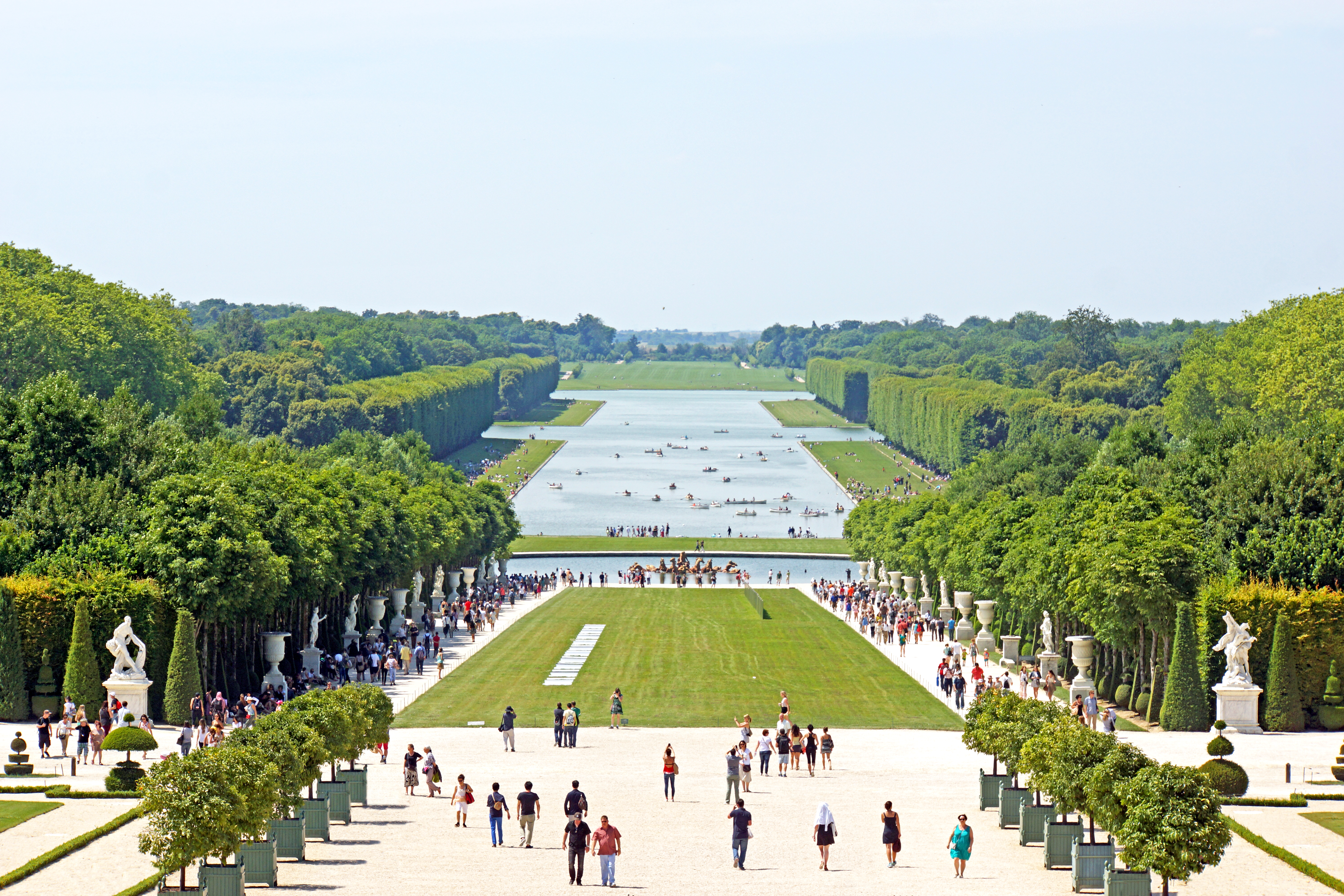 Gardens of Versailles, France.